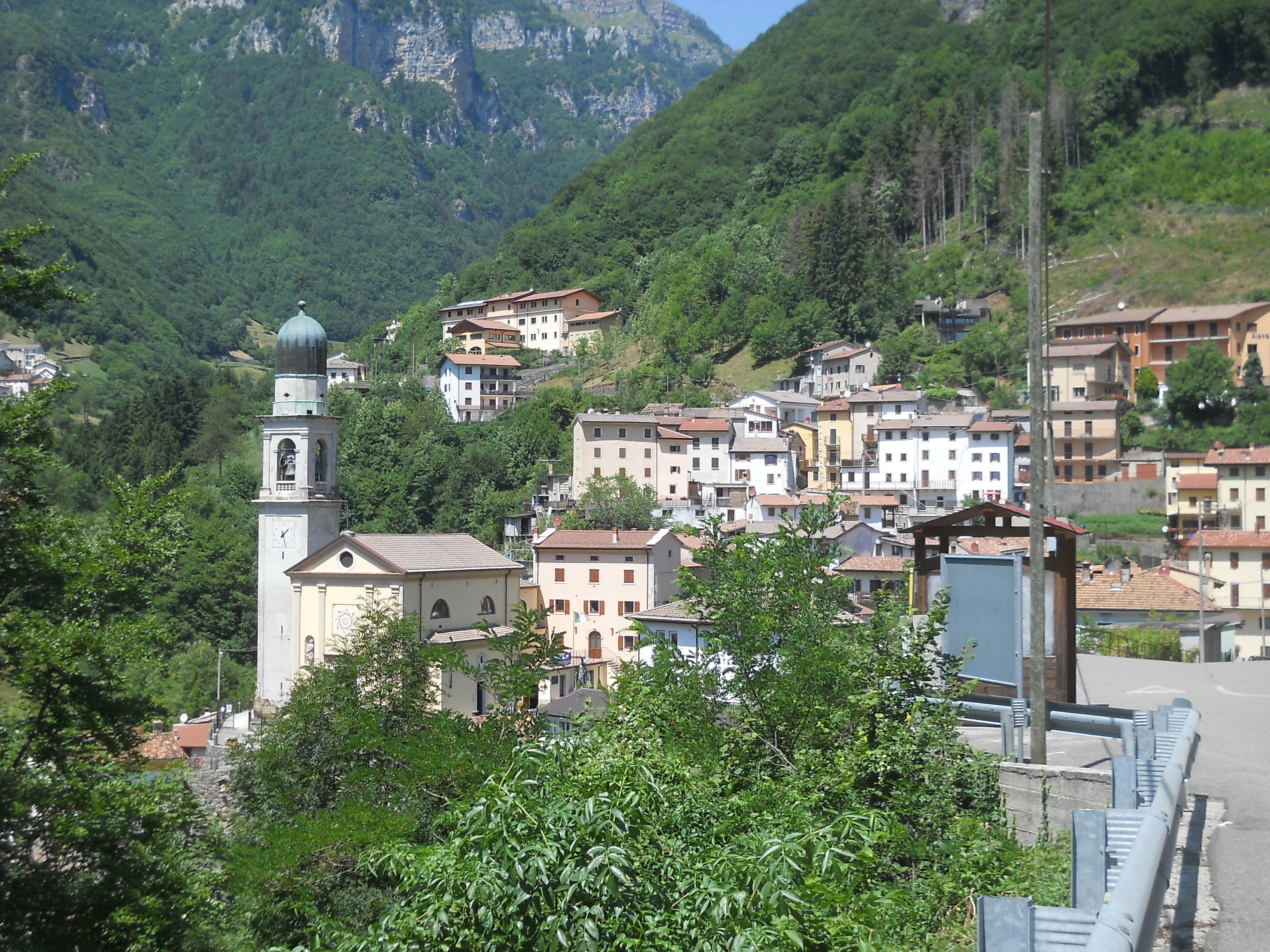 Panorama della frazione di Giazza nel comune di Selva di Progno (provincia di Verona)